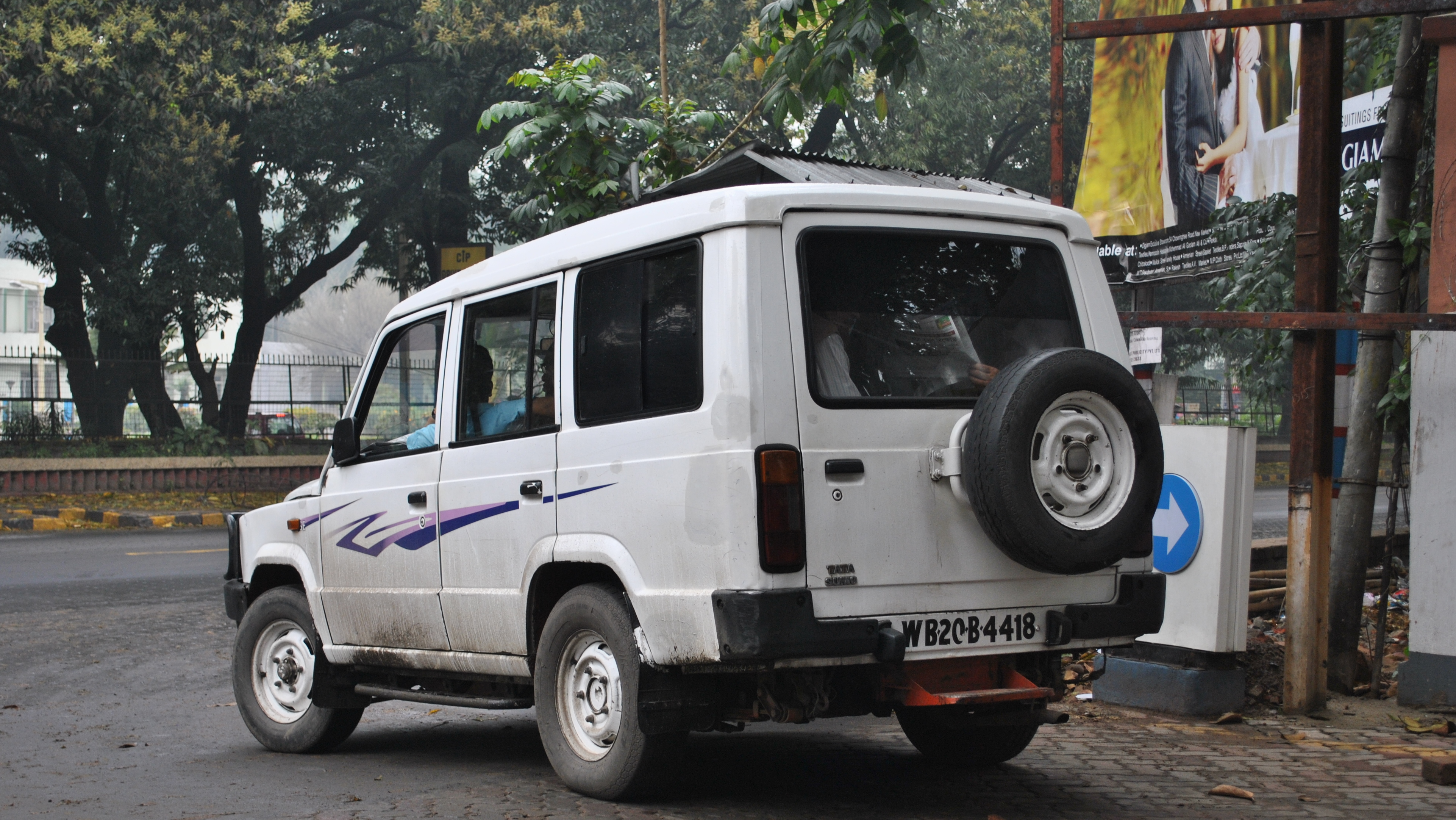 Our journey starts...